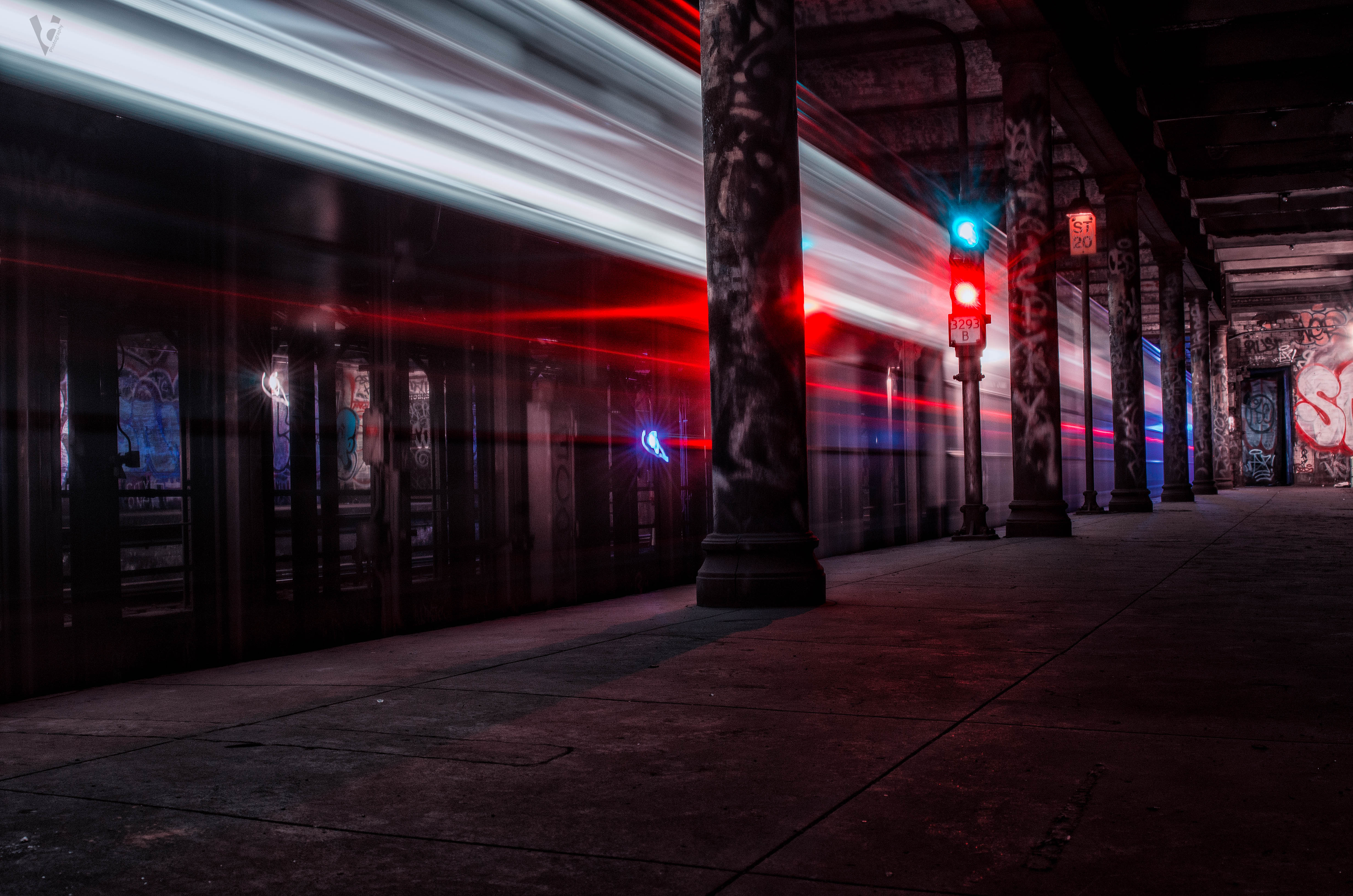 U.S.A Underground